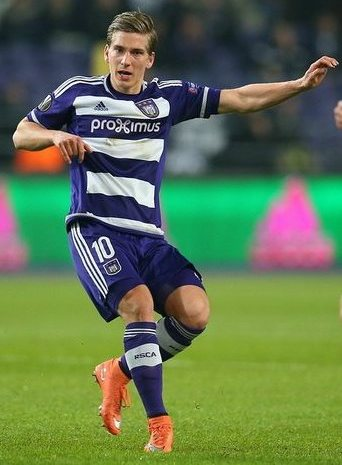 Денніс Прат - футболіст ФК Андерлехта